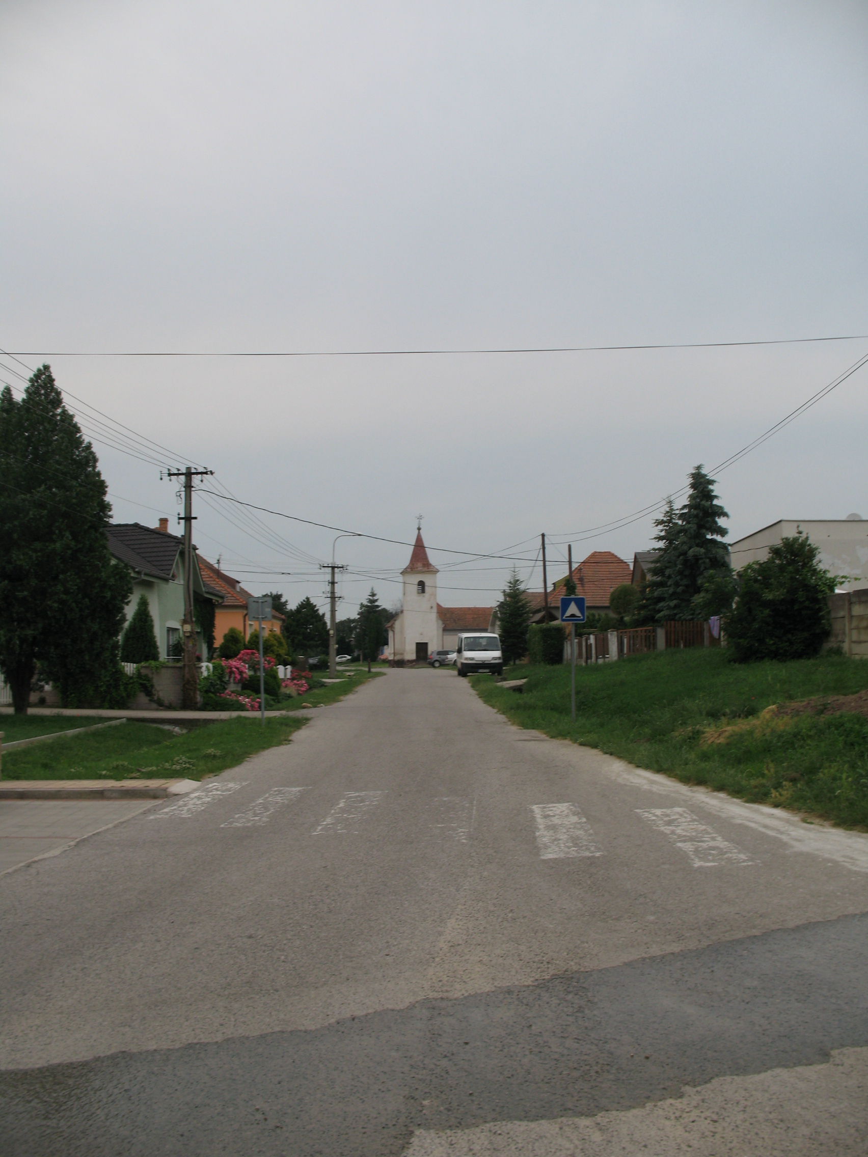 Pusztakürt